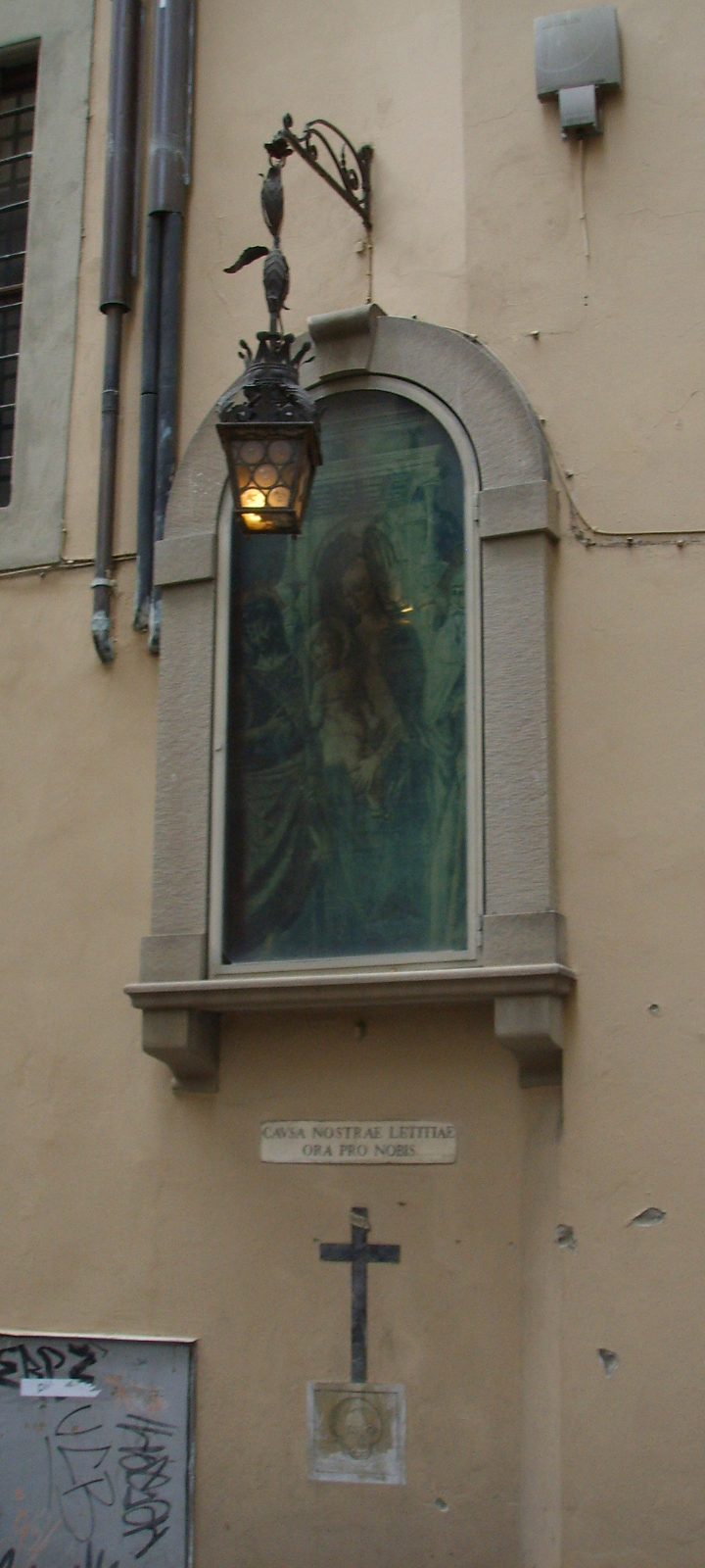 Tabernacolo via del campanile